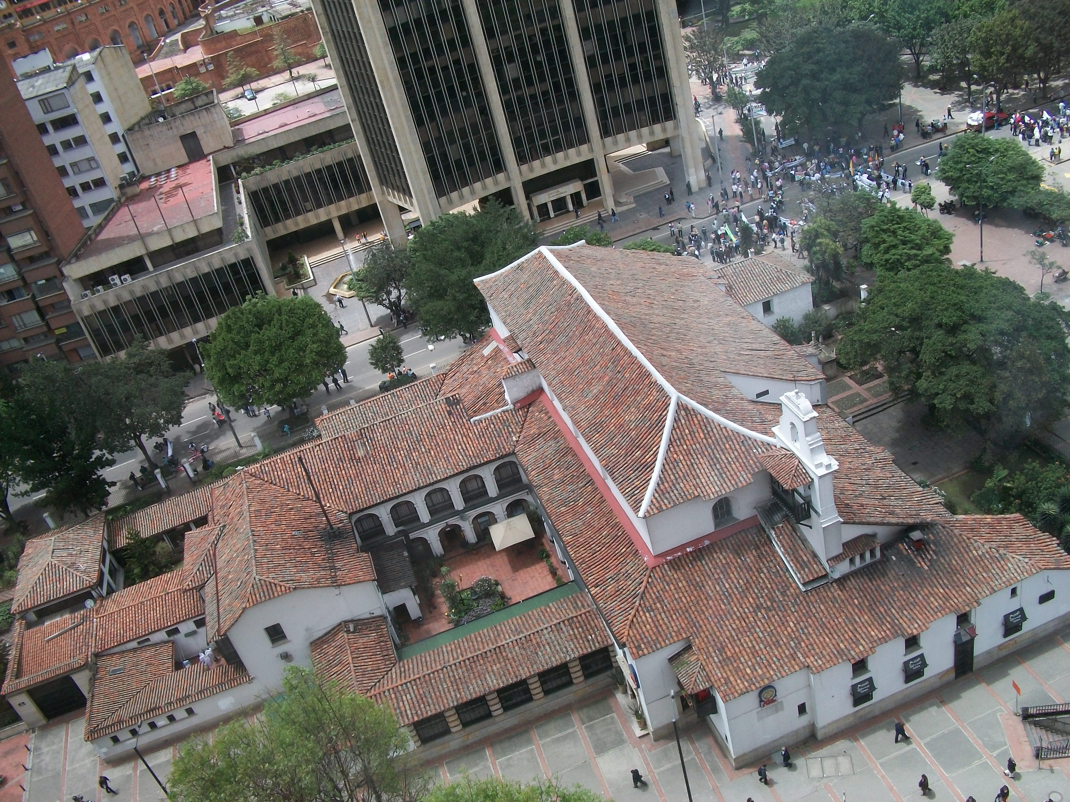 Vista de la iglesia de San diego desde el piso 17 del hotel Teqendama.